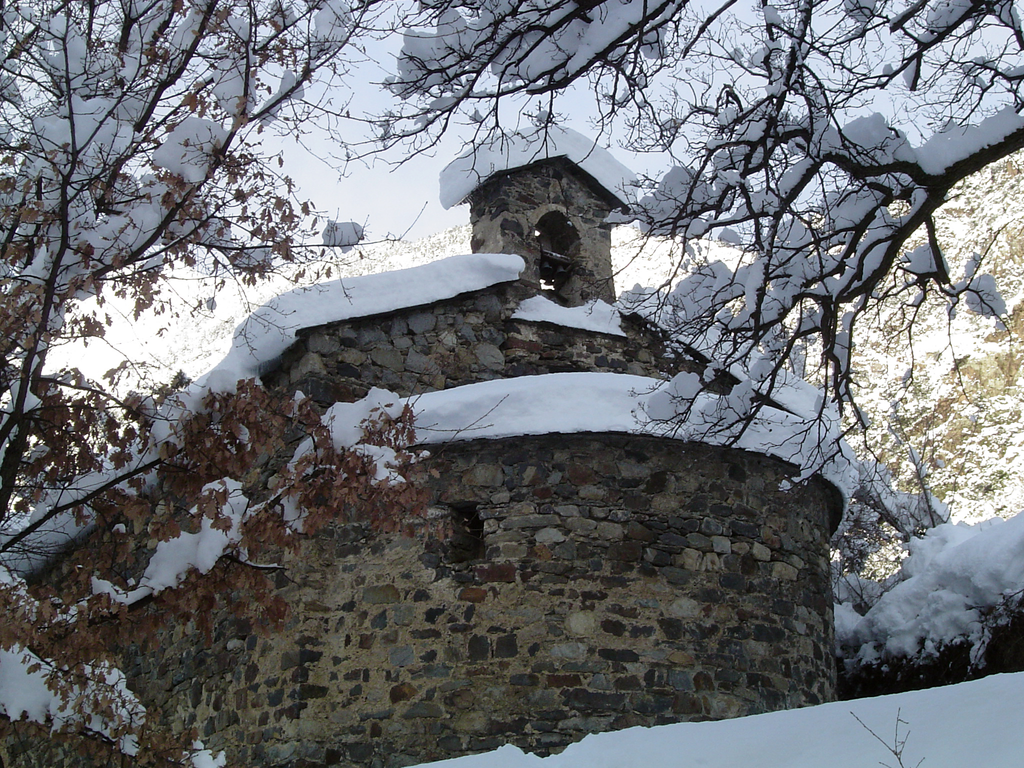 Petita esglesia románica